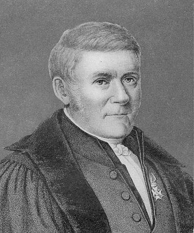 Petrus Hofmann Peerlkamp Petrus Hofmann Peerlkamp